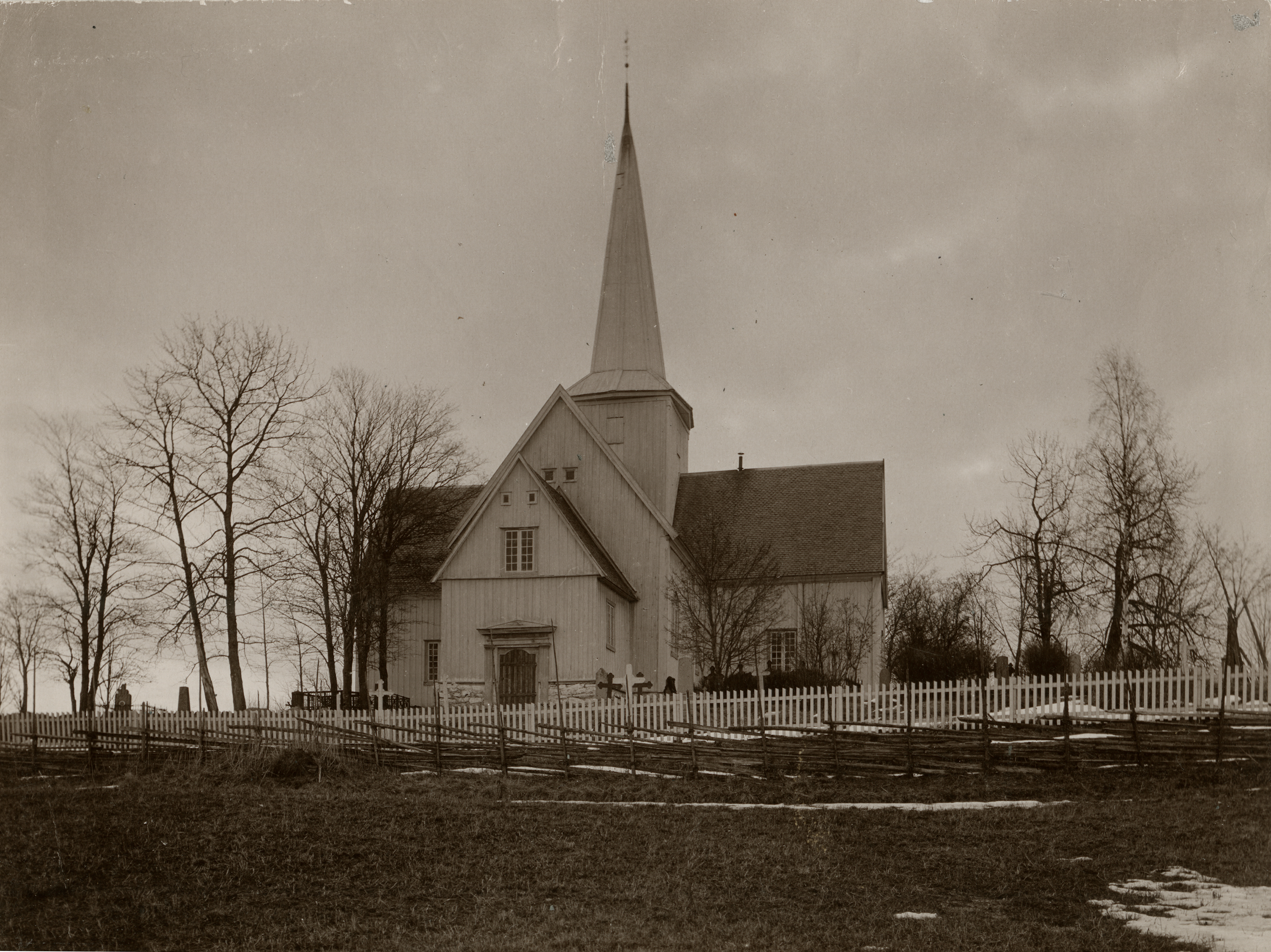 Ullensaker kirke i Ullensaker, Akershus Kirken brant 1952